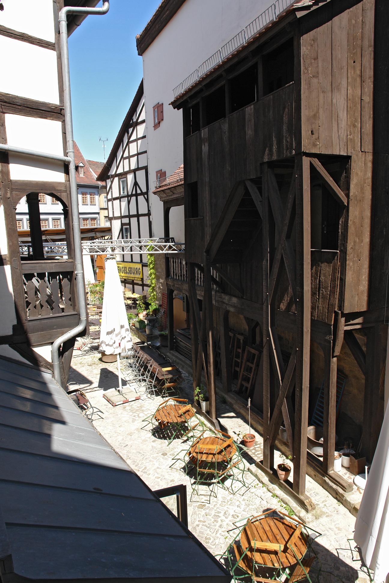 Erfurt, Thuringia, Germany Engelsburg